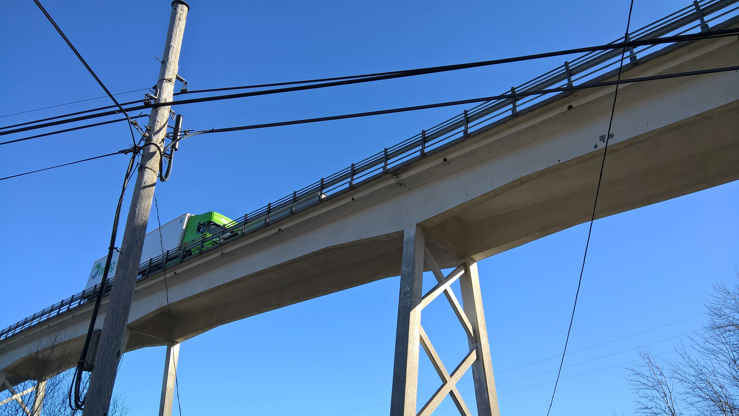 Dragsundbroen